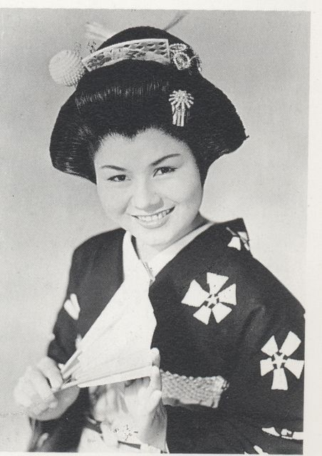 1950年代のブロマイドをスキャン